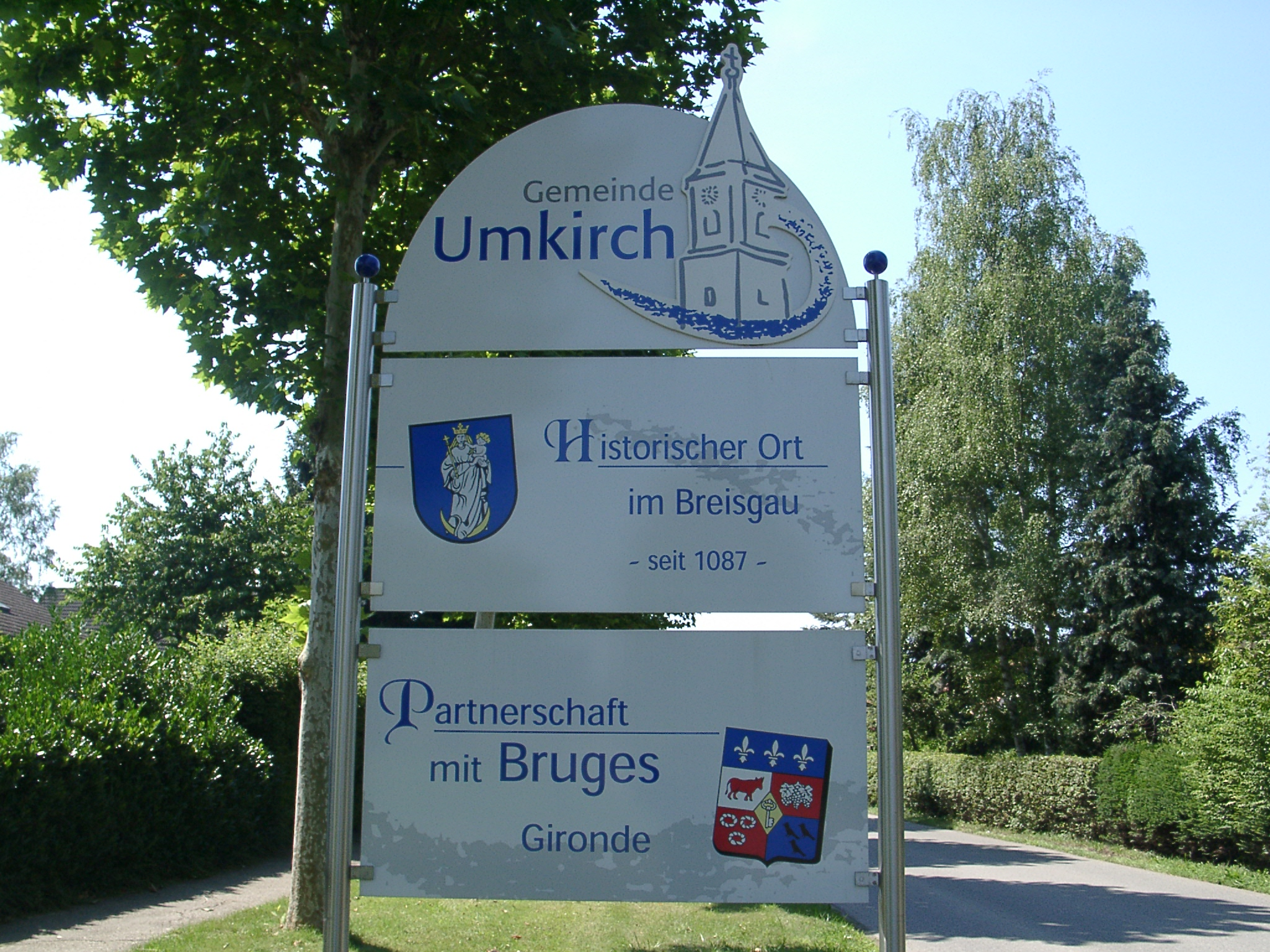 Wappentafel Umkirch - selbst fotografiert (Klaus Graf) 17.7.2005